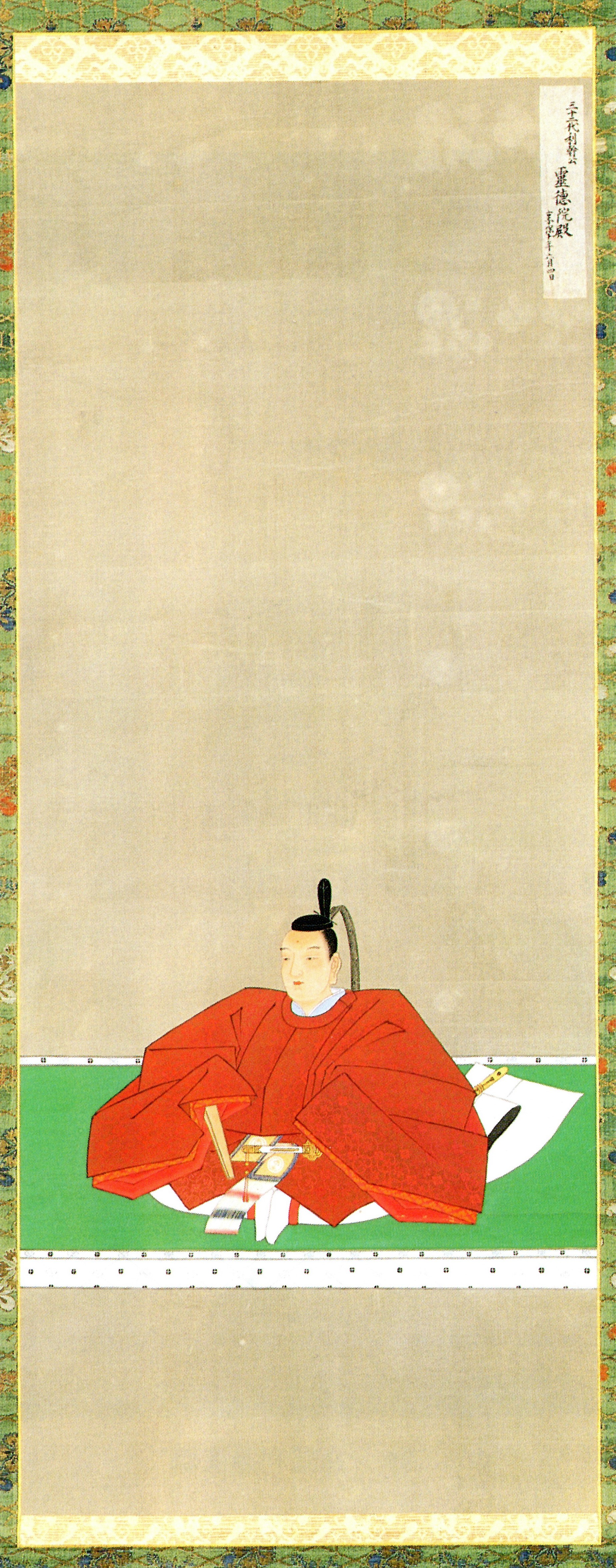 南部利幹の肖像。